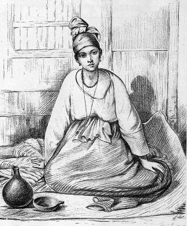 Femme métisse du Sénégal. Signare en négligé (illustration de Côte occidentale d'Afrique du Colonel Frey, fig. 4, p. 7)